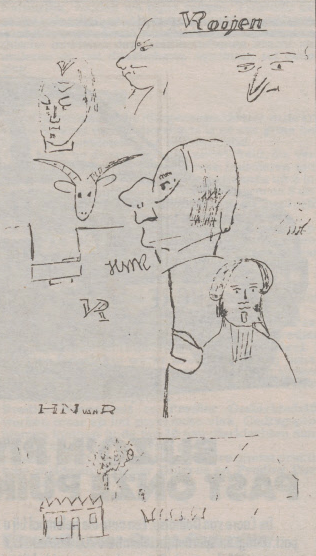 Schetsen van Hendricus Nicolaus van Roijen (1831-1874)